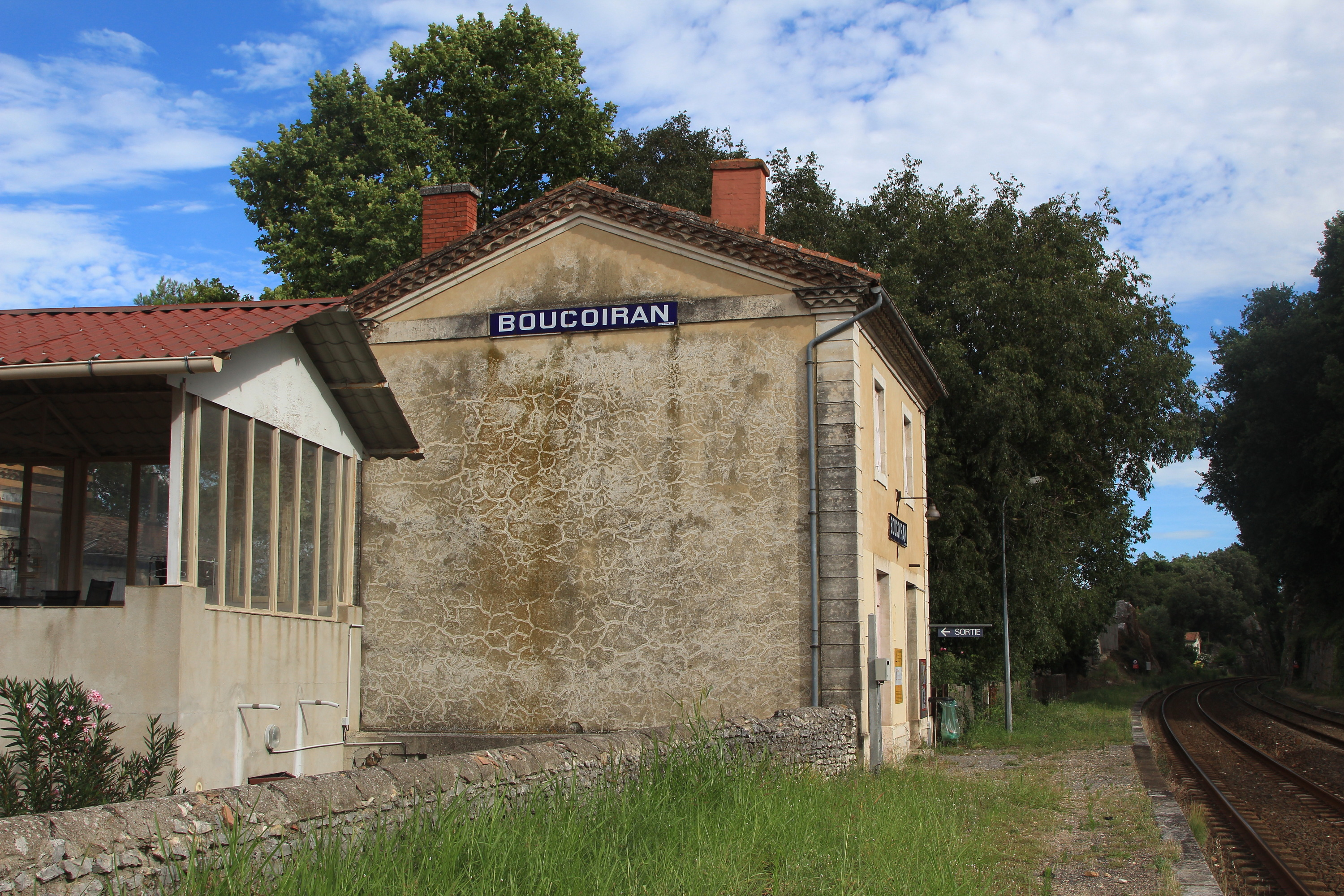 Le bâtiment voyageurs de la gare de Boucoirant vu côté voies.